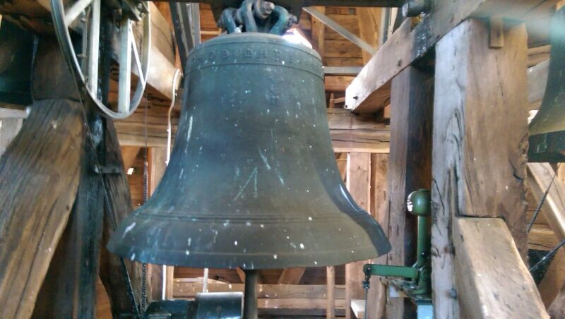 Glocke (a), Evangelische Martinskirche Wehrda